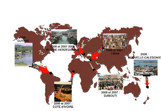 le fond de projection du 57e RA